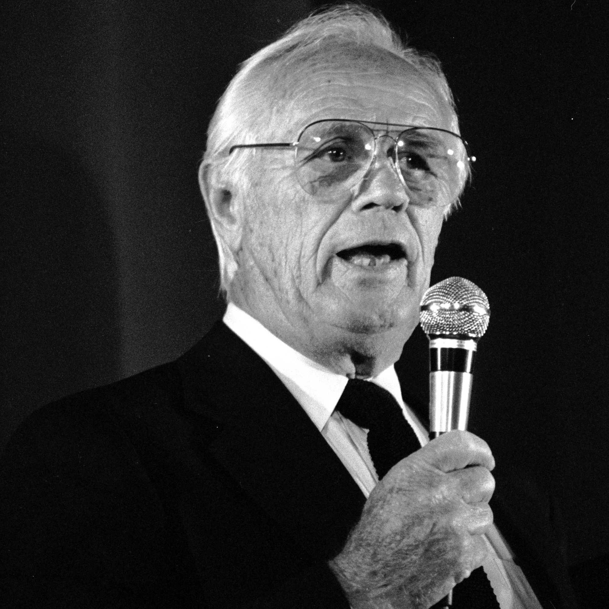 L'acteur américain Richard Widmark au Festival du cinéma américain à Deauville (Normandie, France) en septembre 1991.